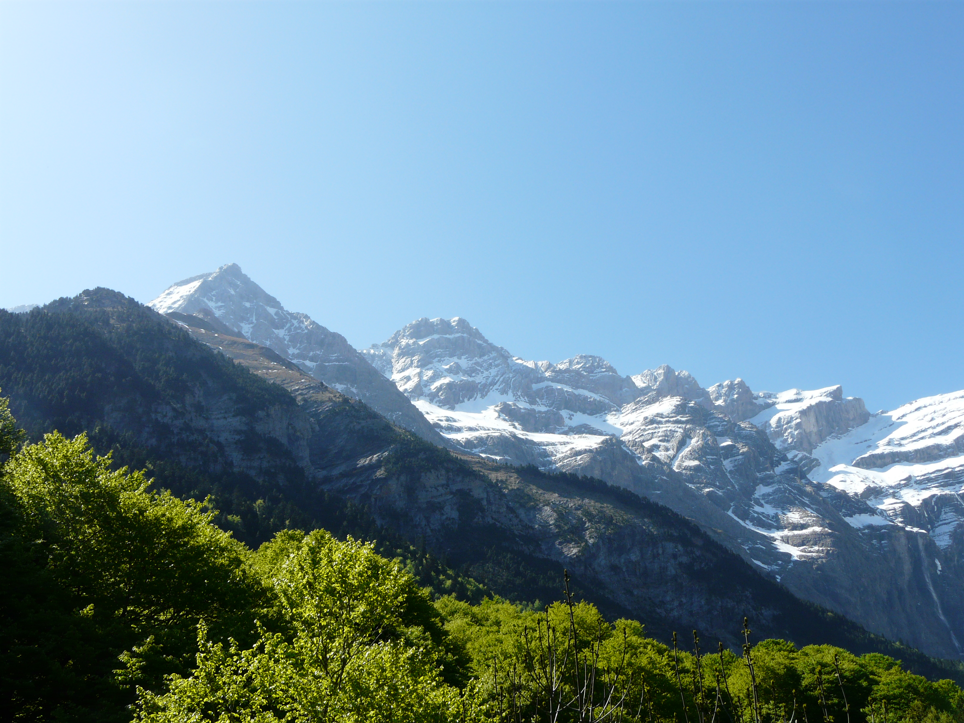 La partie orientale du cirque de Gavarnie vue depuis le belvédère situé au nord du cirque. De gauche à droite : le Petit Astazou, le pic du Marboré et l'Épaule ; Hautes-Pyrénées, France.